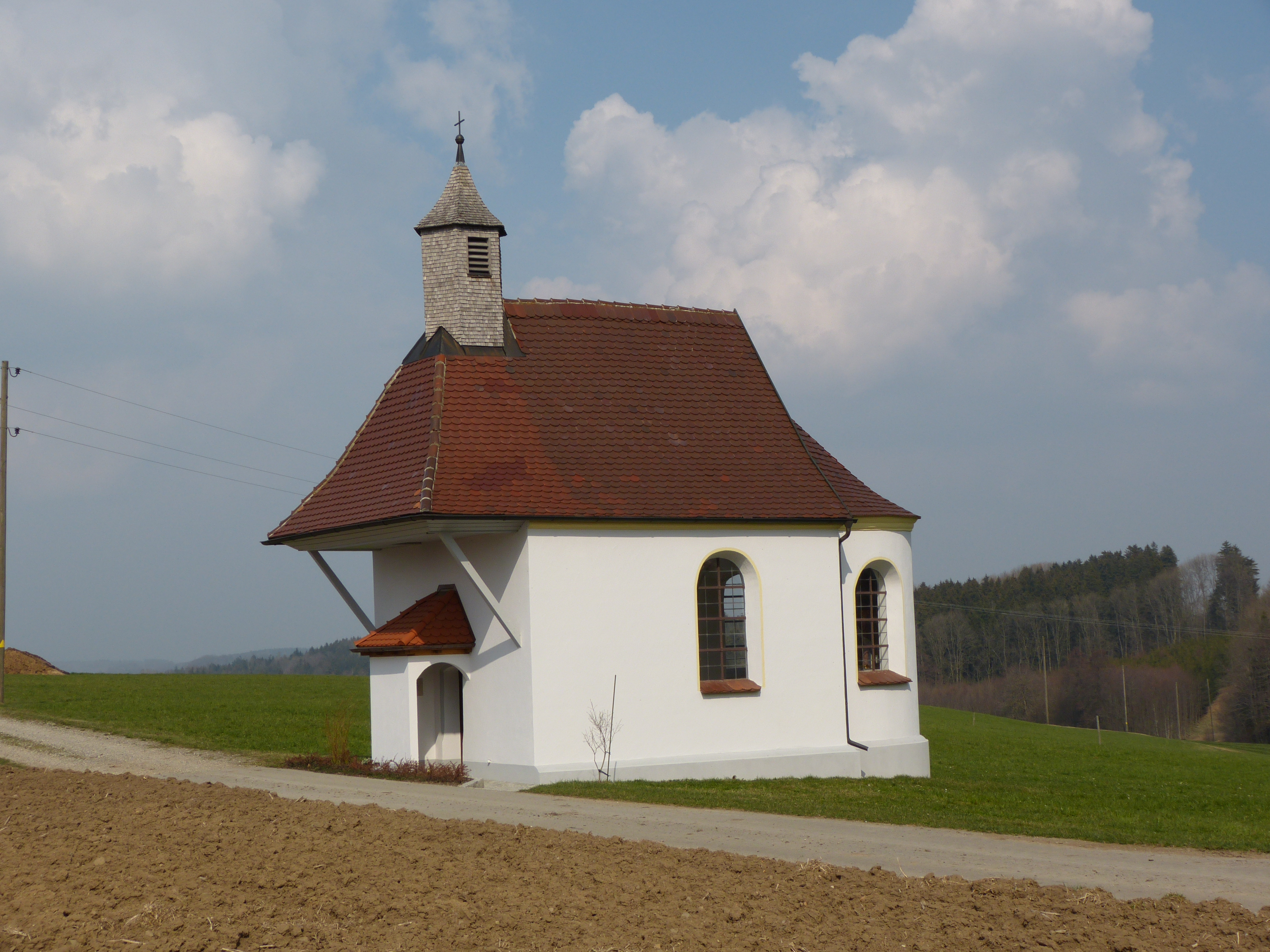 Kapelle in Vorderbuchenbrunn, Gemeinde Markt Rettenbach, Landkreis Unterallgäu, Bayern